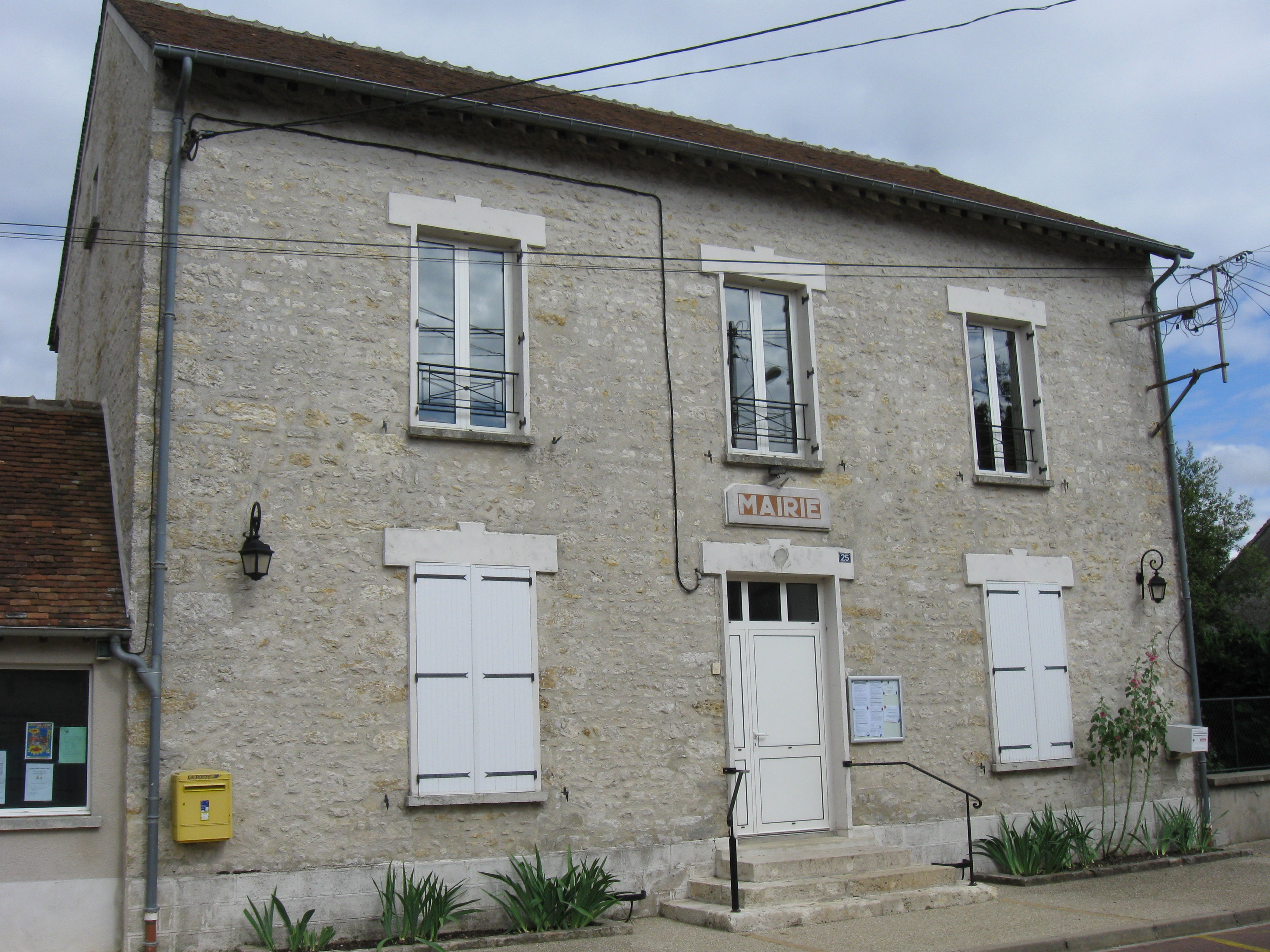 Mairie de Burcy. (département de Seine-et-Marne, région Île-de-France).